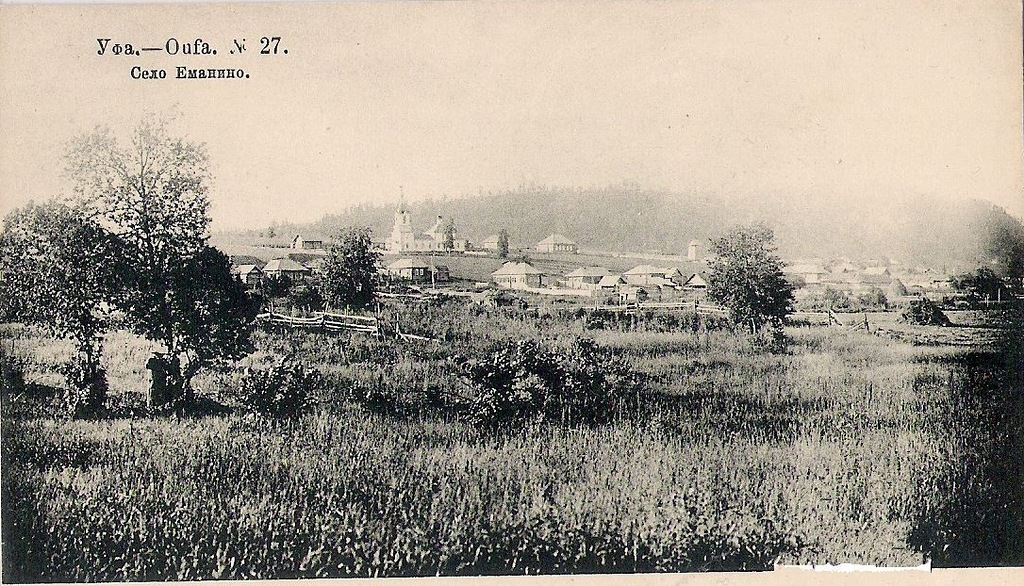 Уфа. Дореволюционные открытки с видами города